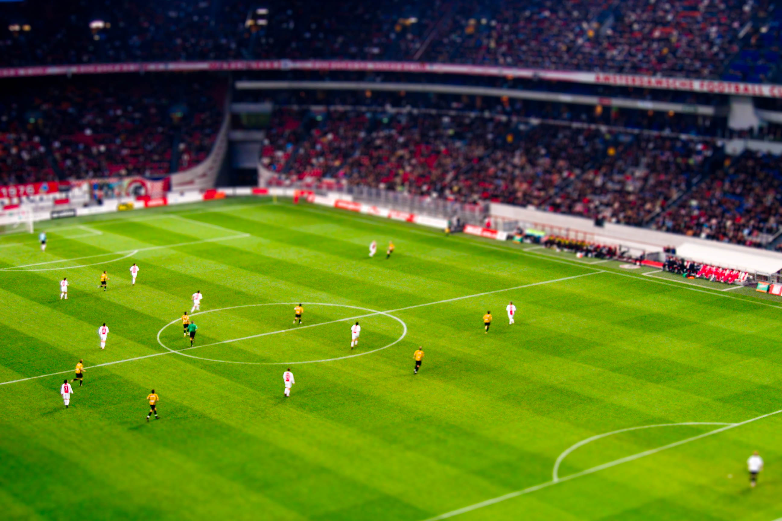 Jogo do Ajax X Vitesse, Amsterdã Arena